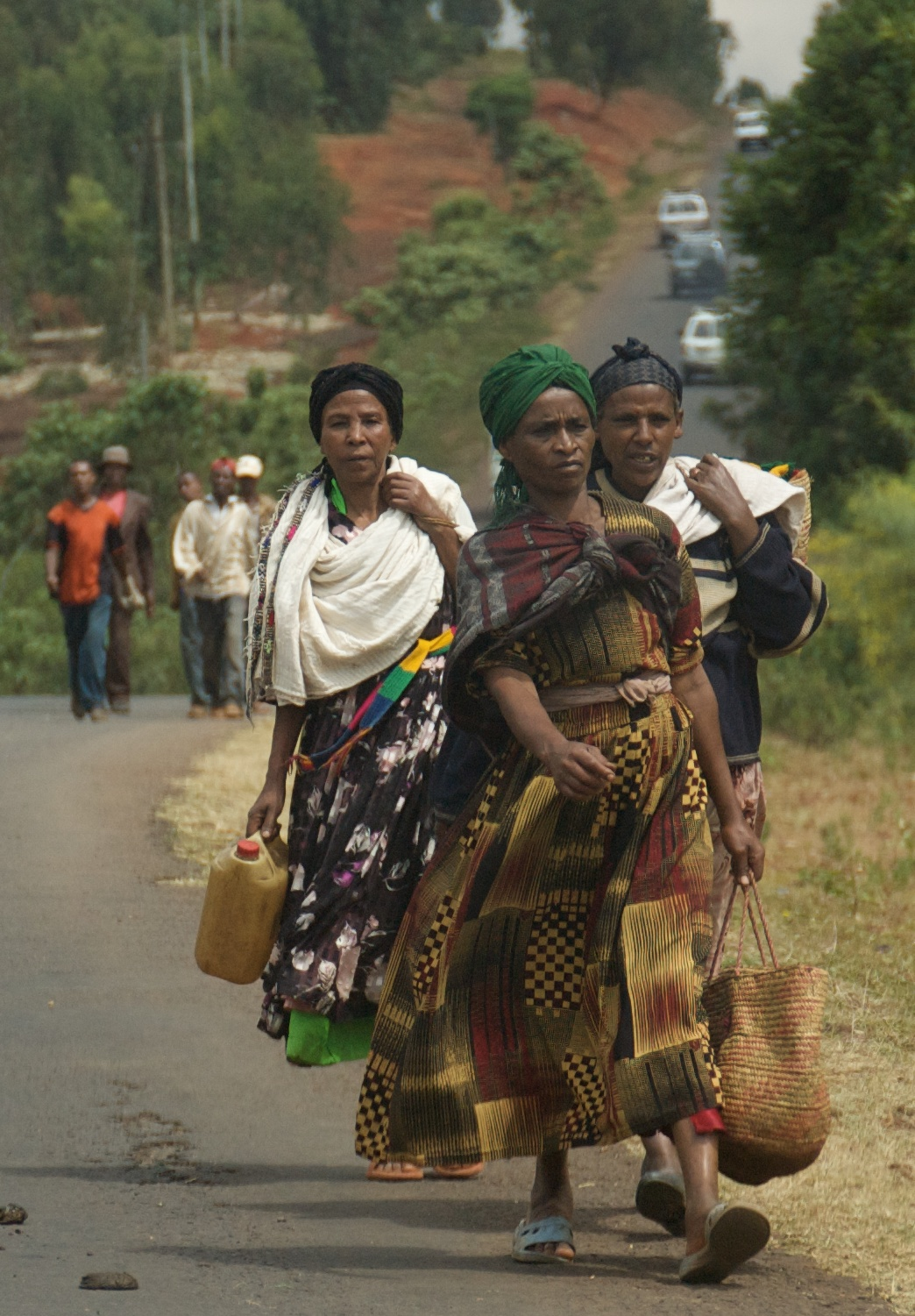 Ethiopia, 2007.